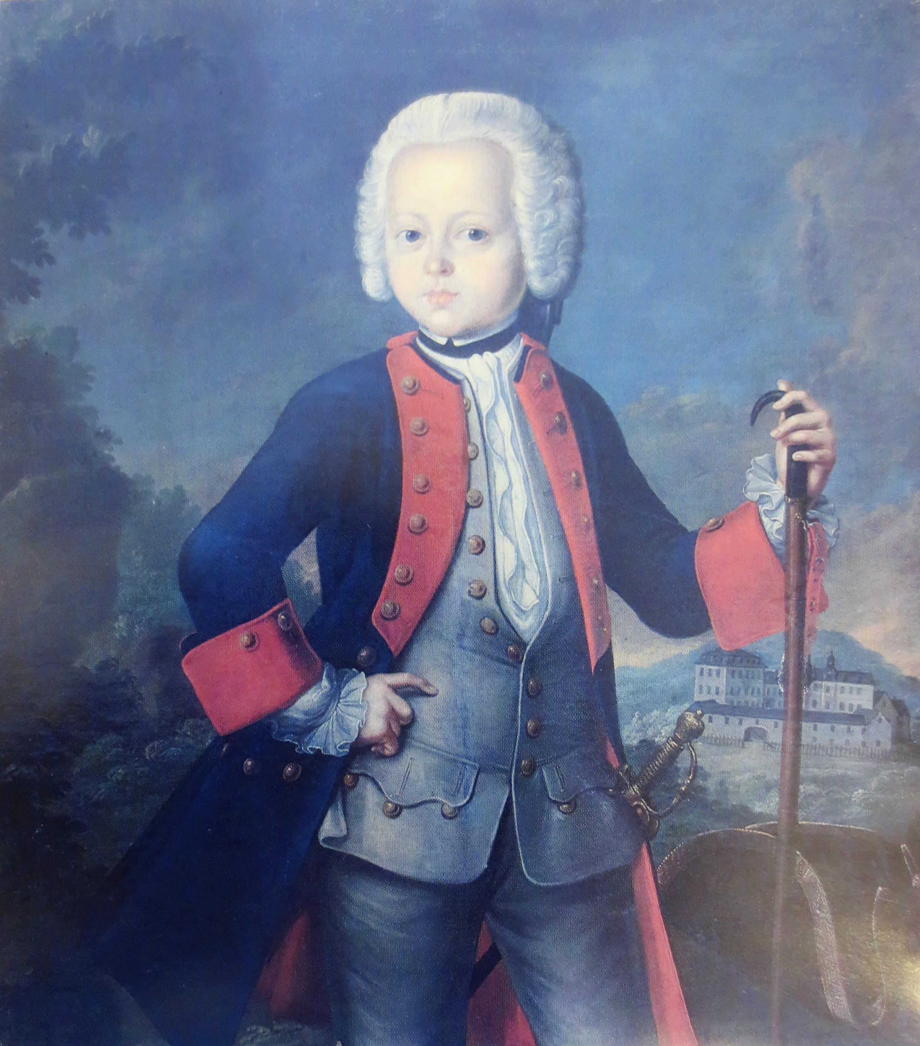 Johann Ludwig zu Sayn-Wittgenstein 1746